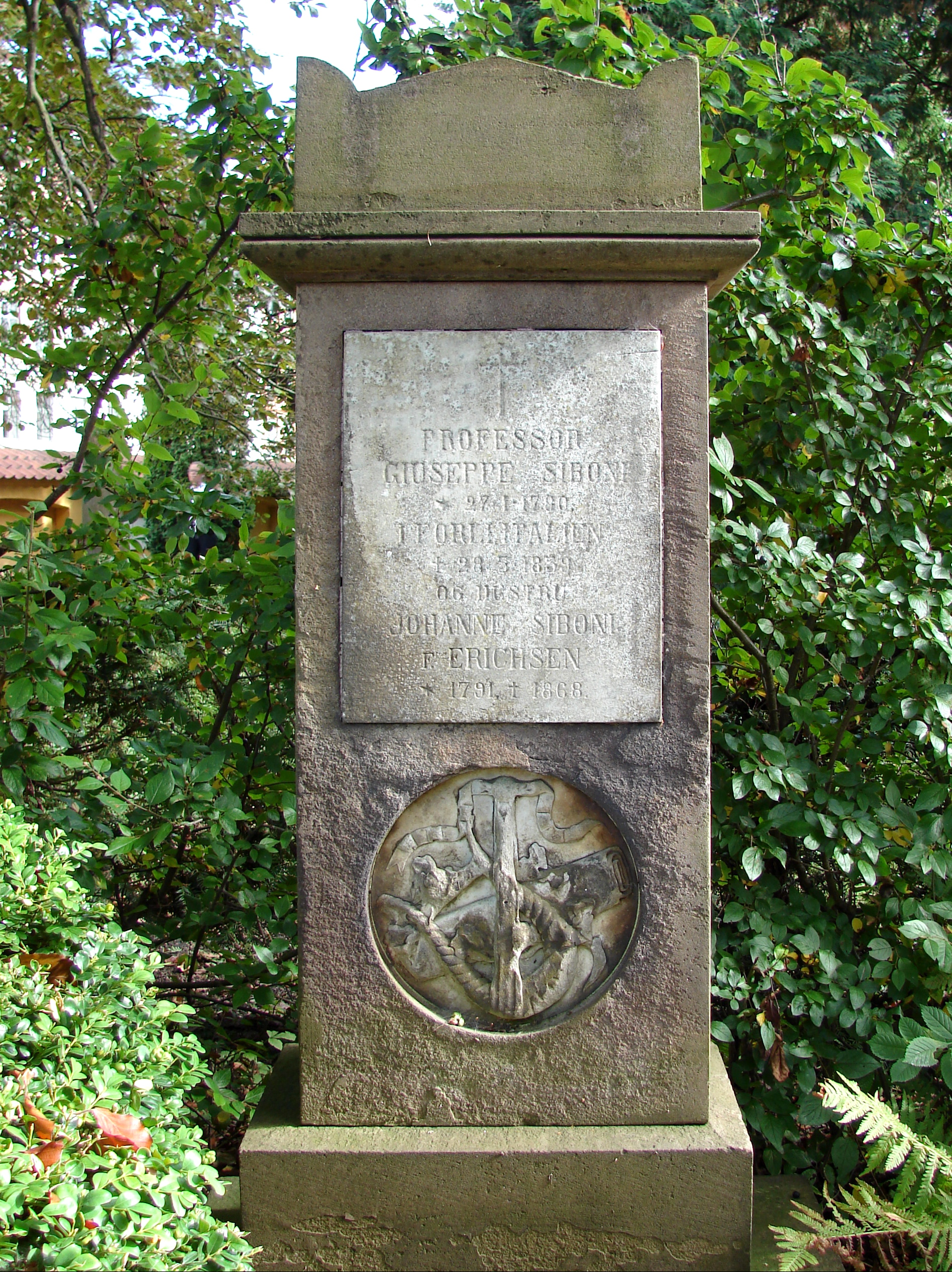 PROFESSOR, GIUSEPPE SIBONI, * 27.1-1780, i Forli Italien, † 28.5. 1839, OG HUSTRU, JOHANNE SIBONI, F. ERICHSEN, * 1791 † 1868, gravminde fra Assistens Kirkegård, Nørrebro, København